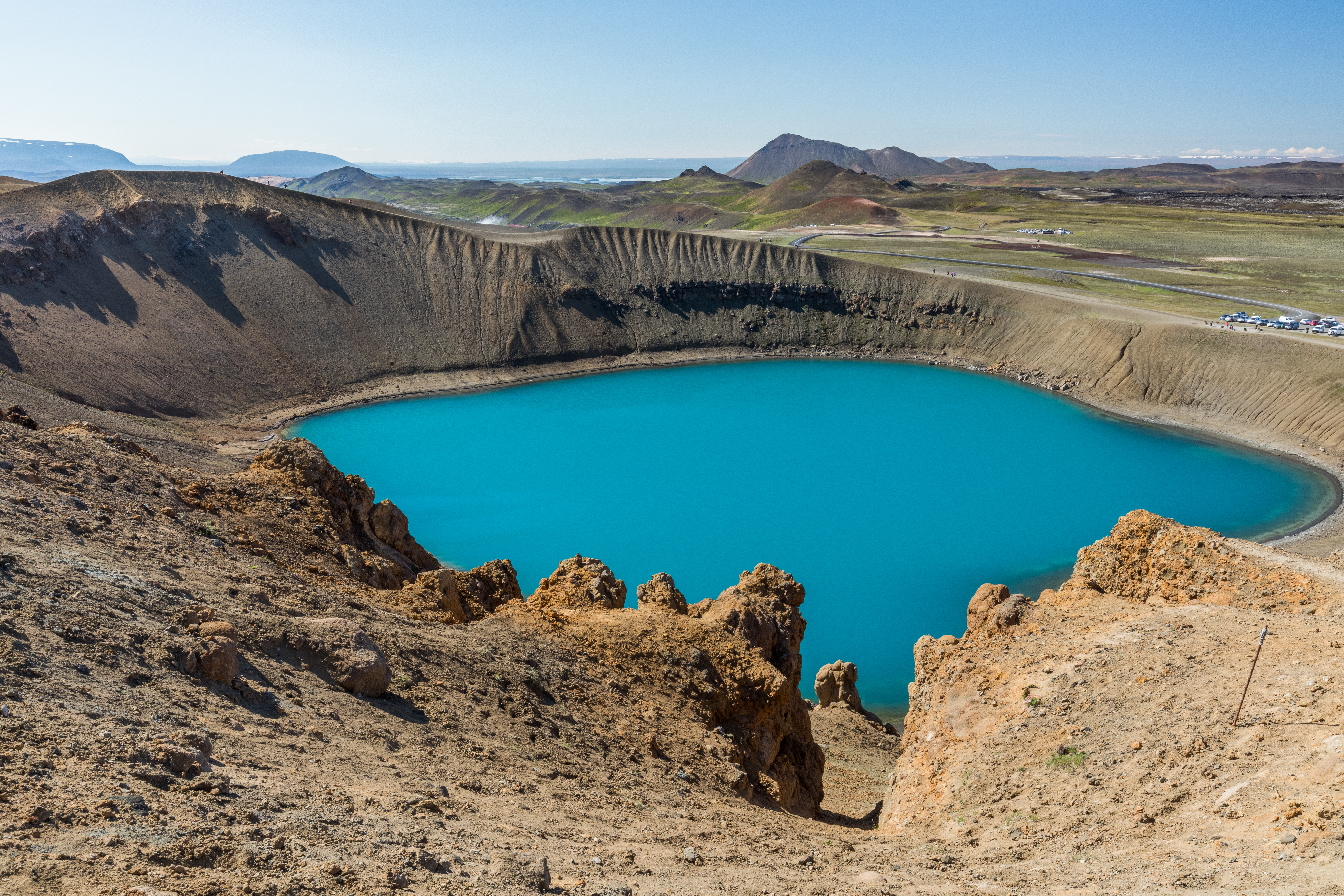 Island_2017_197-0.jpg